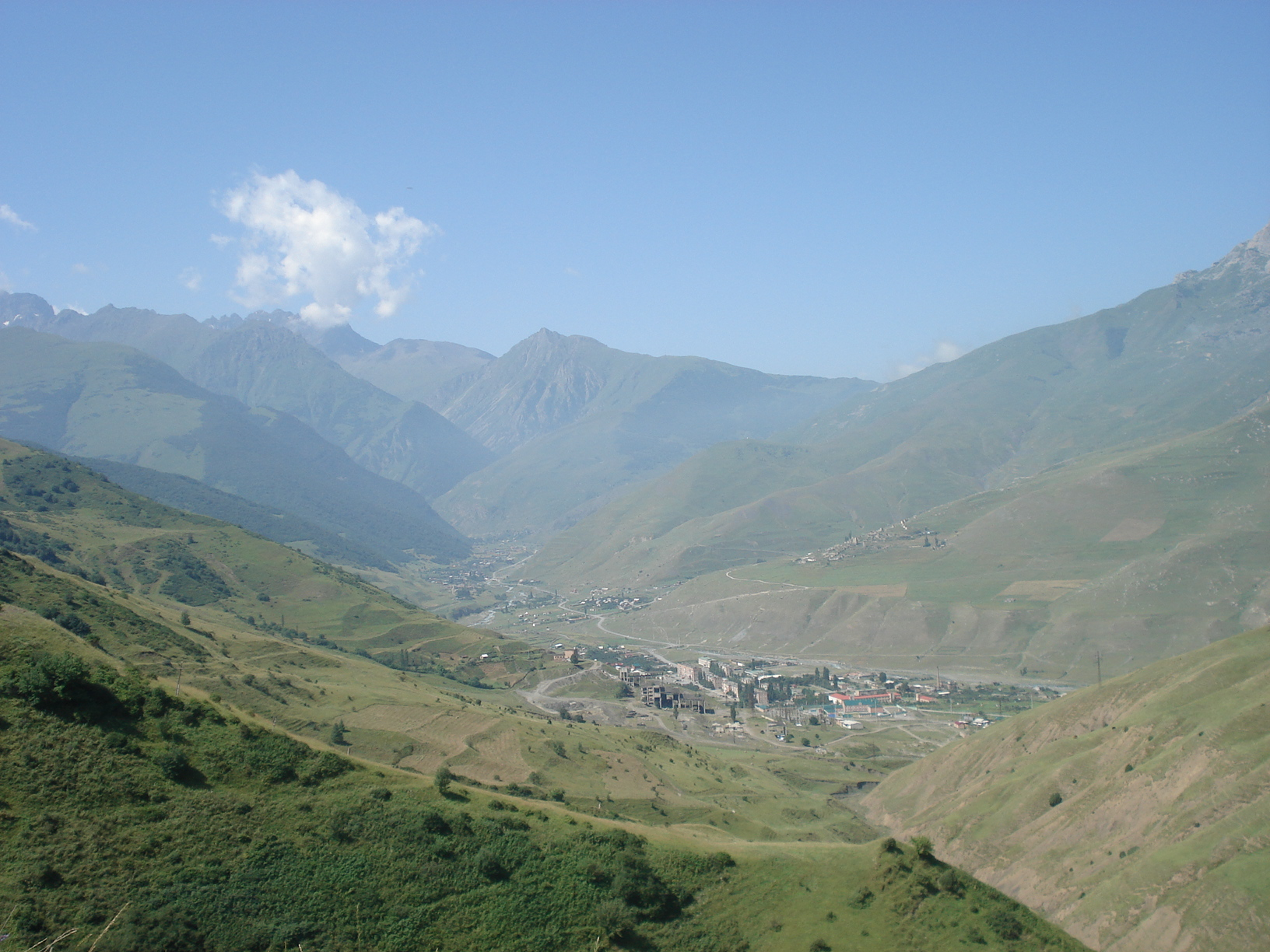 Селение Верхний Фиагдон